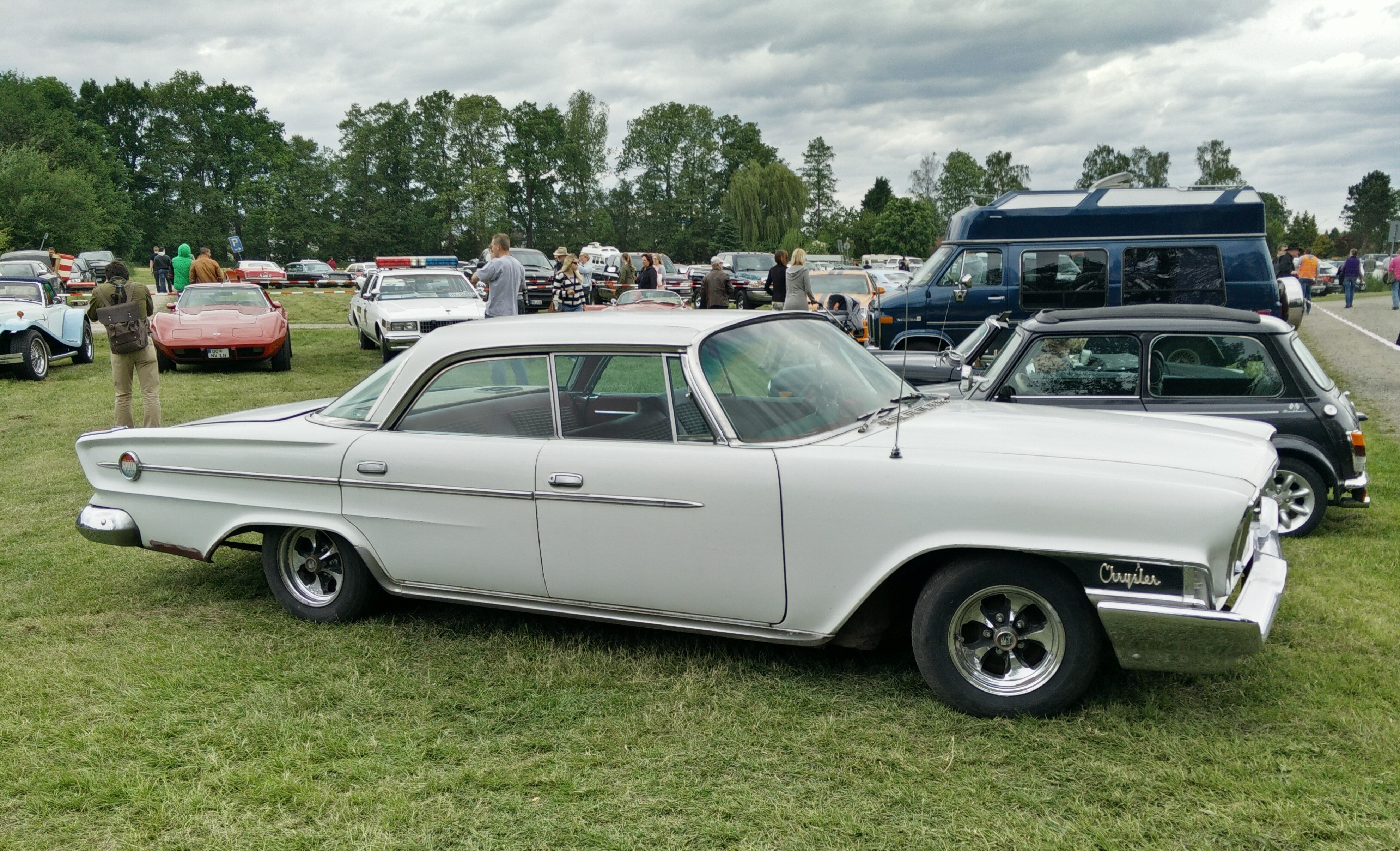 Straßenkreuzer Treffen, Kaunitz 2015